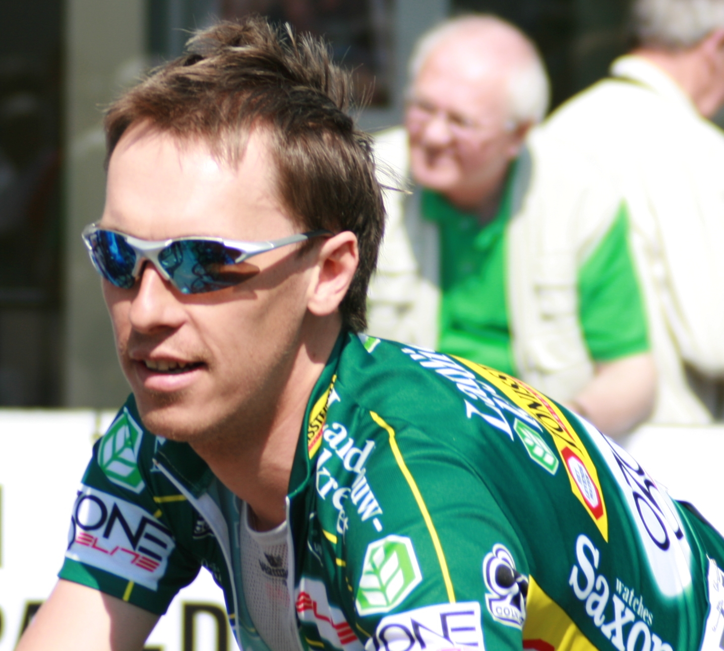 Frédéric Amorison aux Quatre jours de Dunkerque 2008